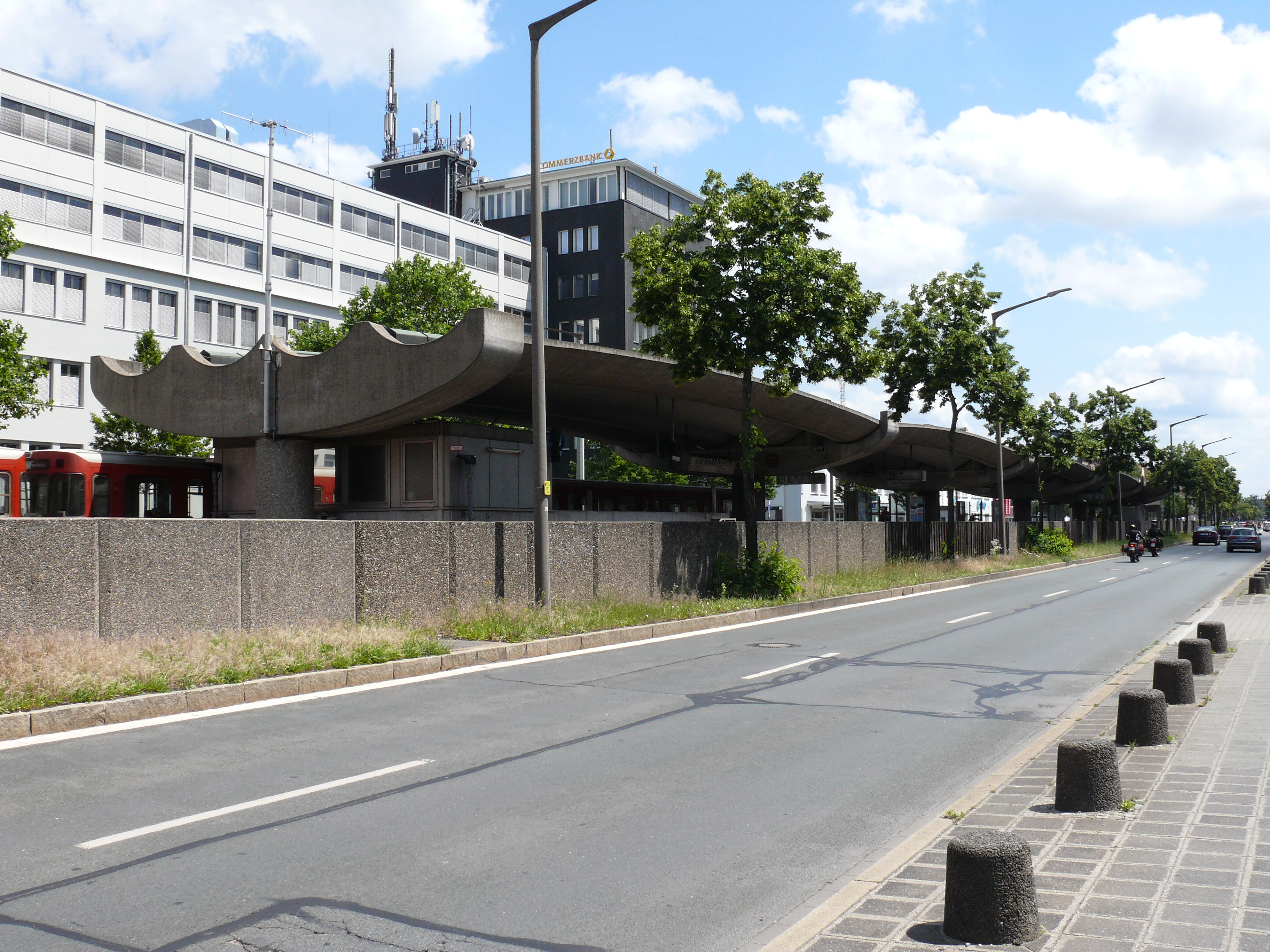 Der oberirdische U-Bahnhof Eberhardshof in Nürnberg. Ansicht von Osten.